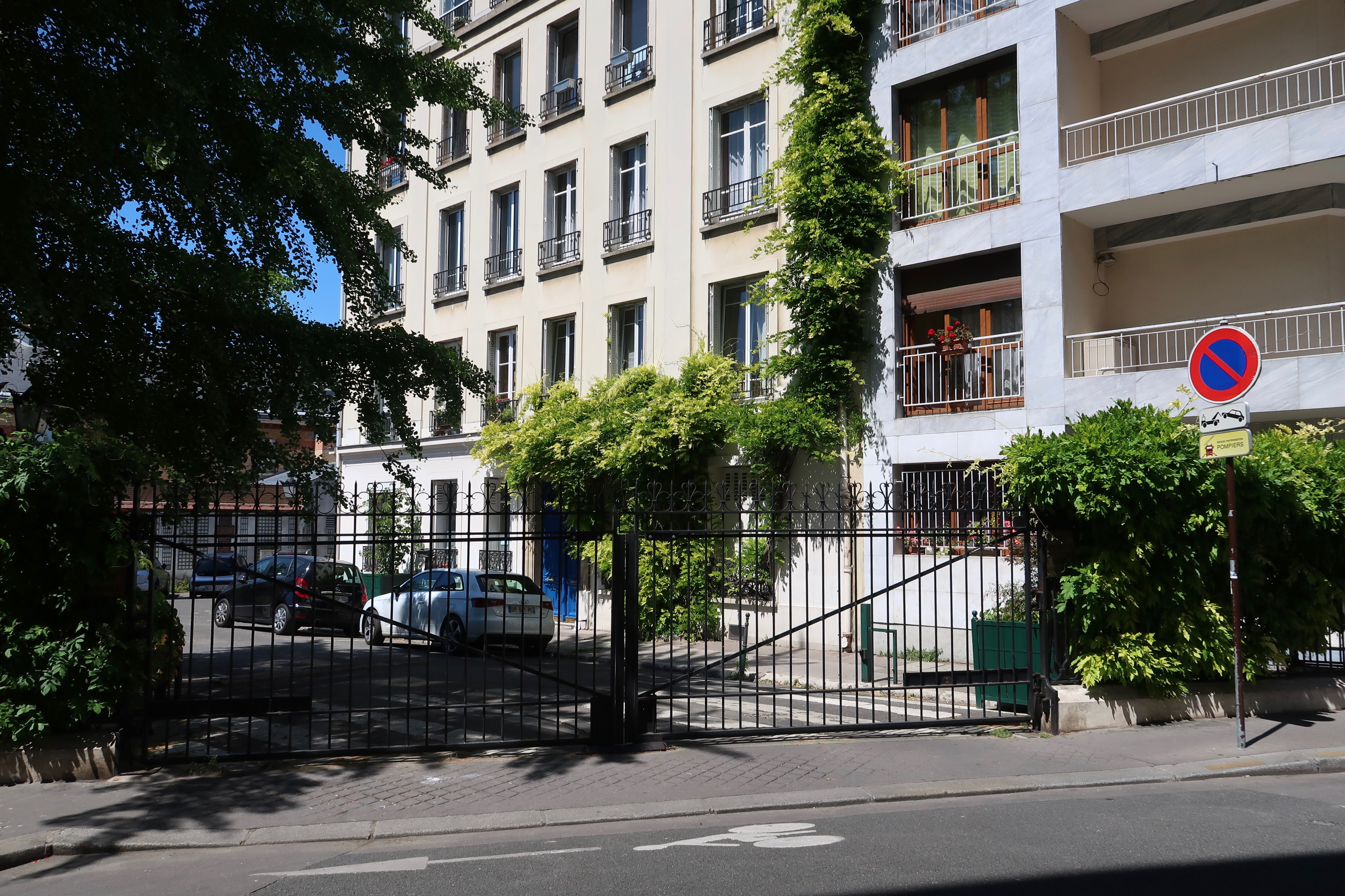 Rue Herran, vue depuis la rue Decamps (Paris, 16e).